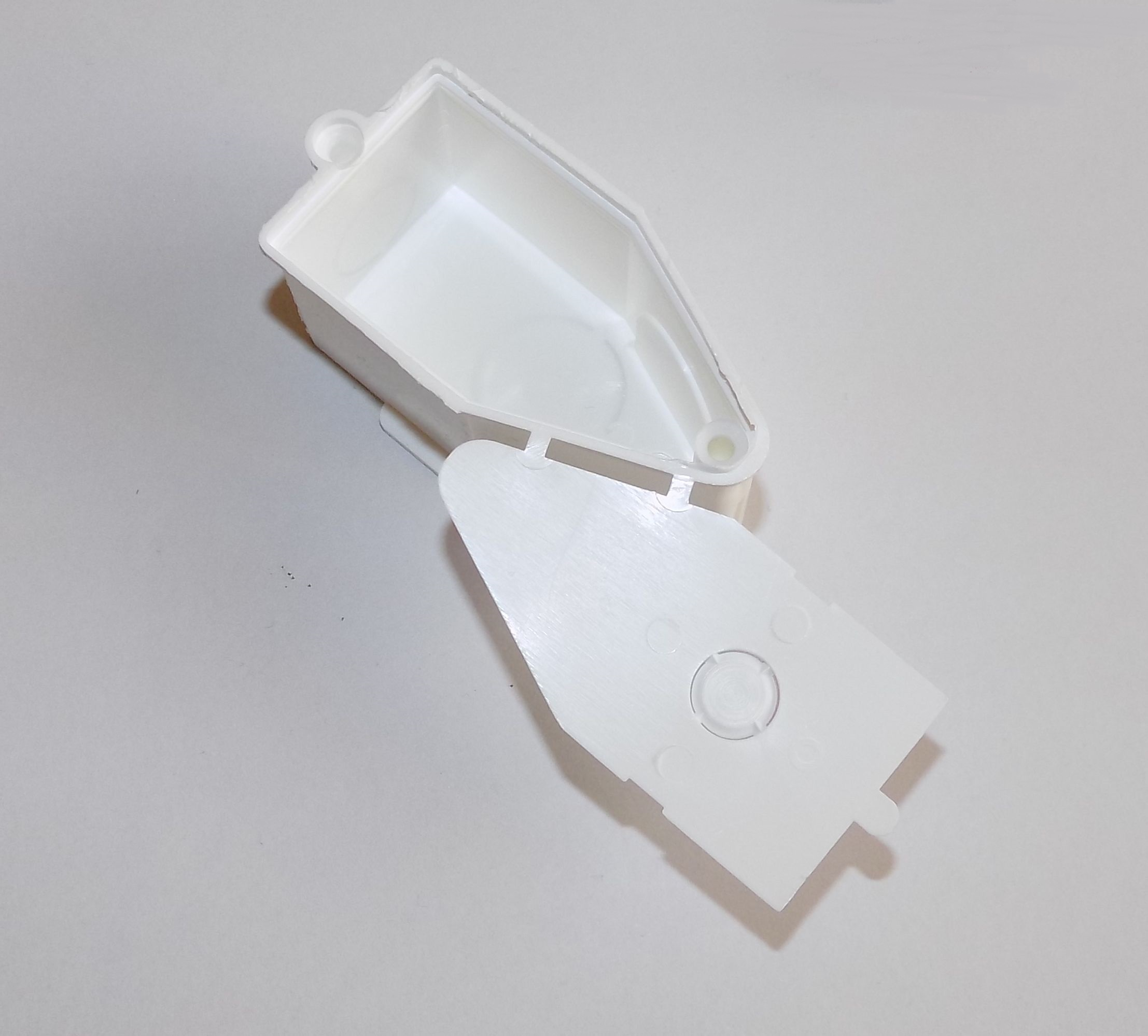 Wandauslassdose